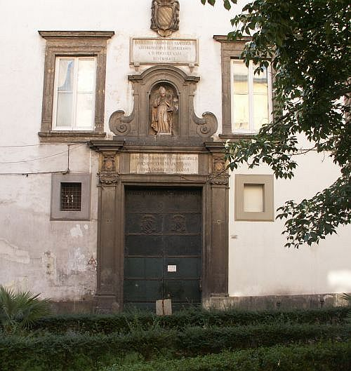 Palazzo Arcivescovile's facade